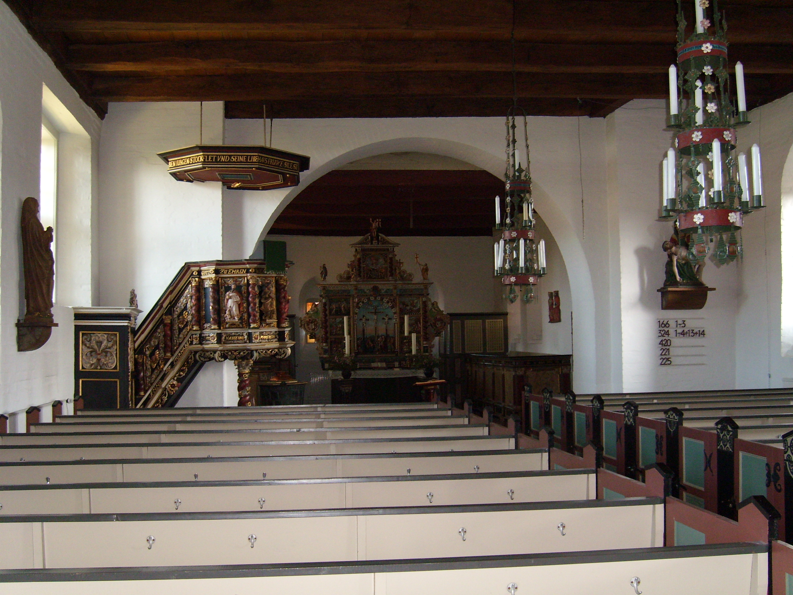 Innenraum der St.-Nicolai-Kirche Beidenfleth, Blick nach vorne zum Altar